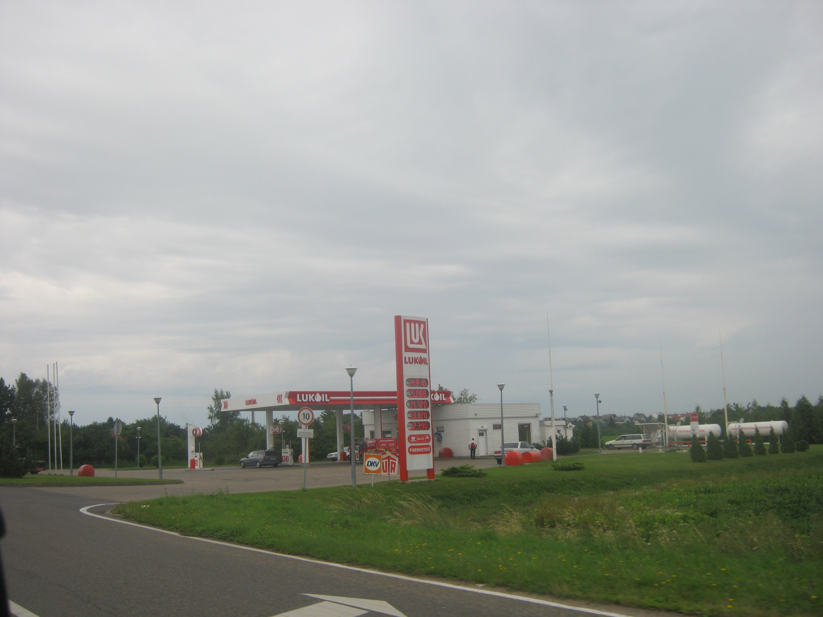 Kalvarija